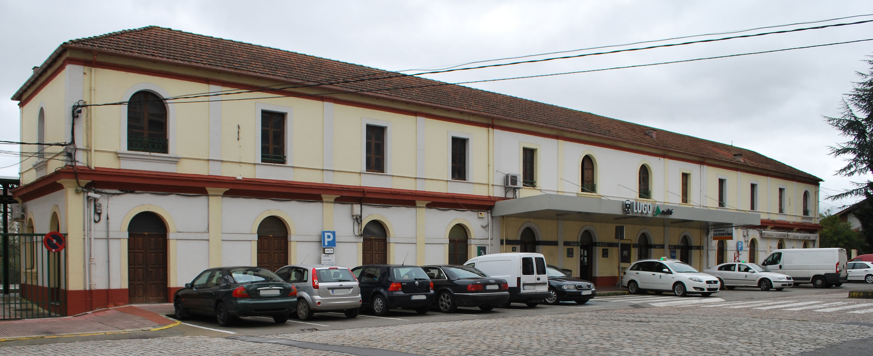 Vista da estación de Lugo